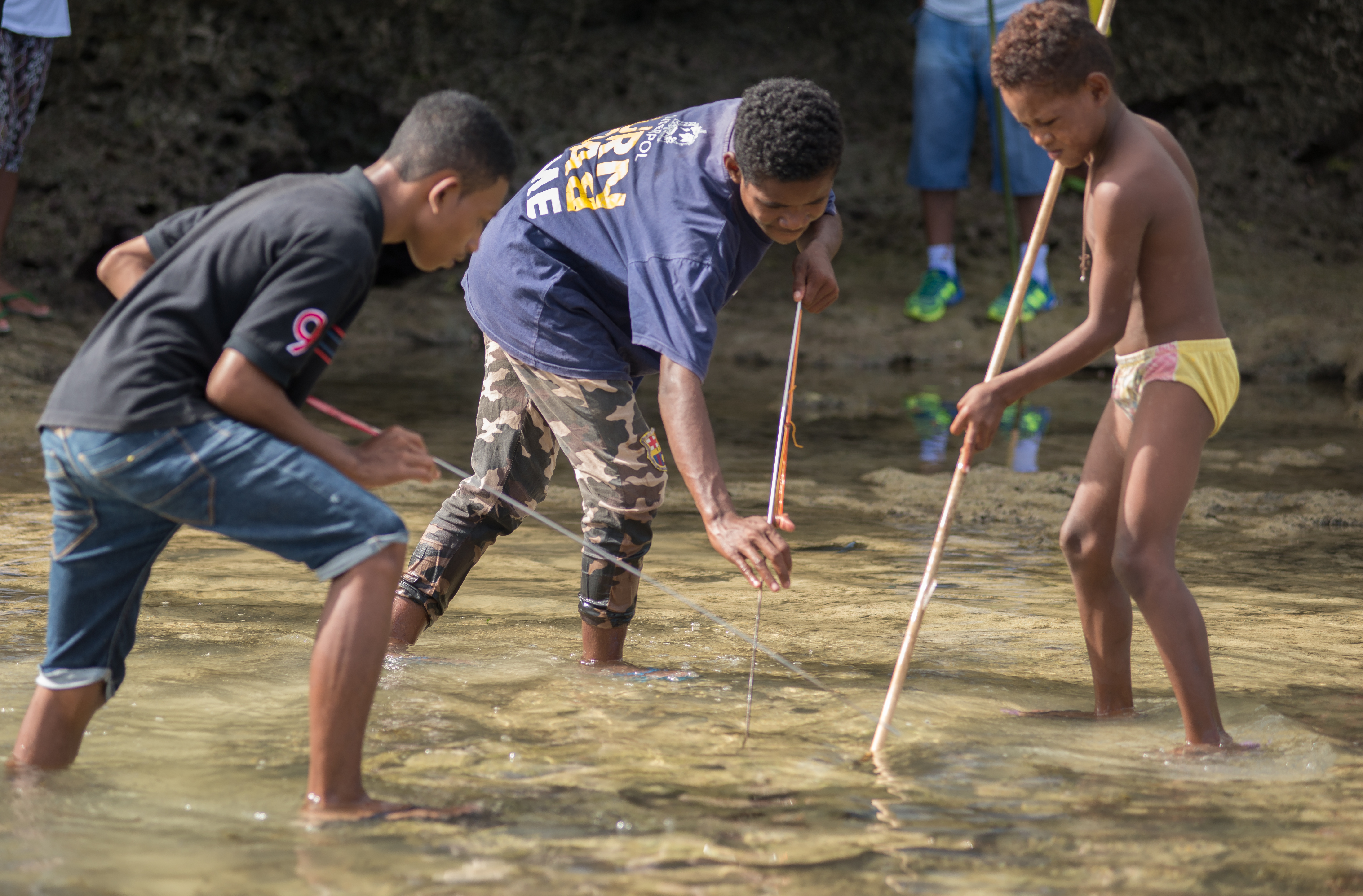 snap mor